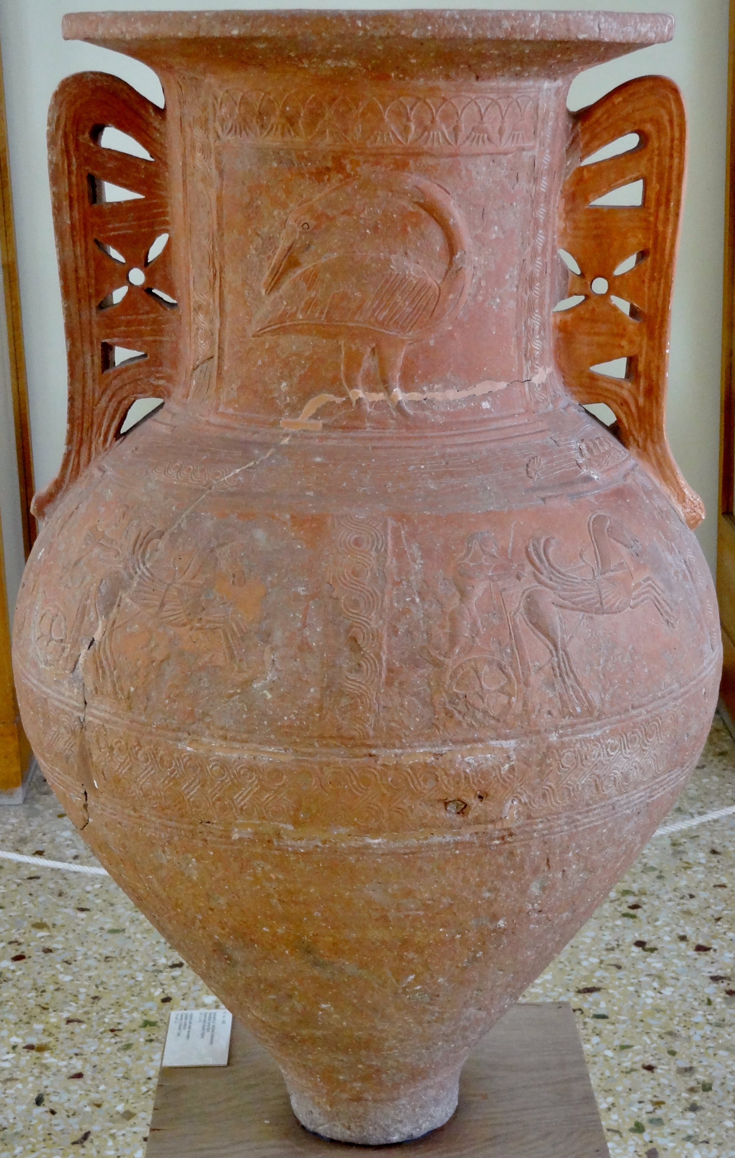 Kykladische Amphore mit Reliefdekoration (7. Jahrhundert v. Chr.) vom Friedhof von Alt-Thera (Santorin) im Archäologischen Museum in Fira, Santorin (Thira), Kykladen, Griechenland